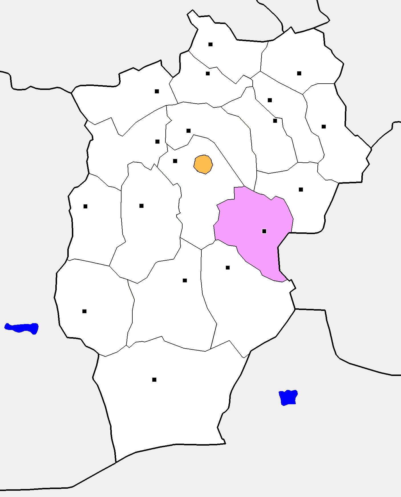 Монгол: Өвөрхангай аймгийн Бат-Өлзий сумын байршил